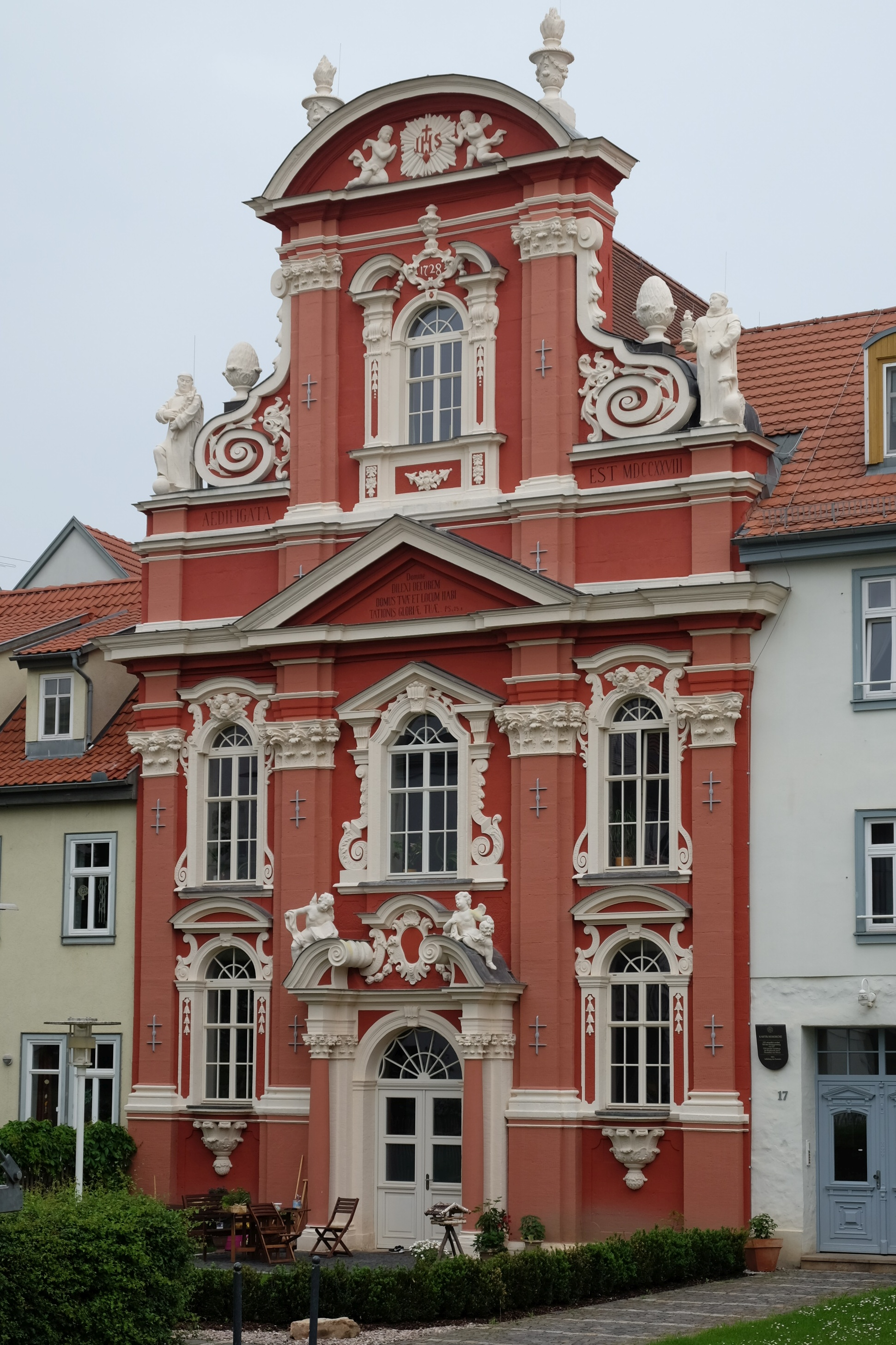 Westportal der Klosterkirche des ehemaligen Kartäuser Klosters